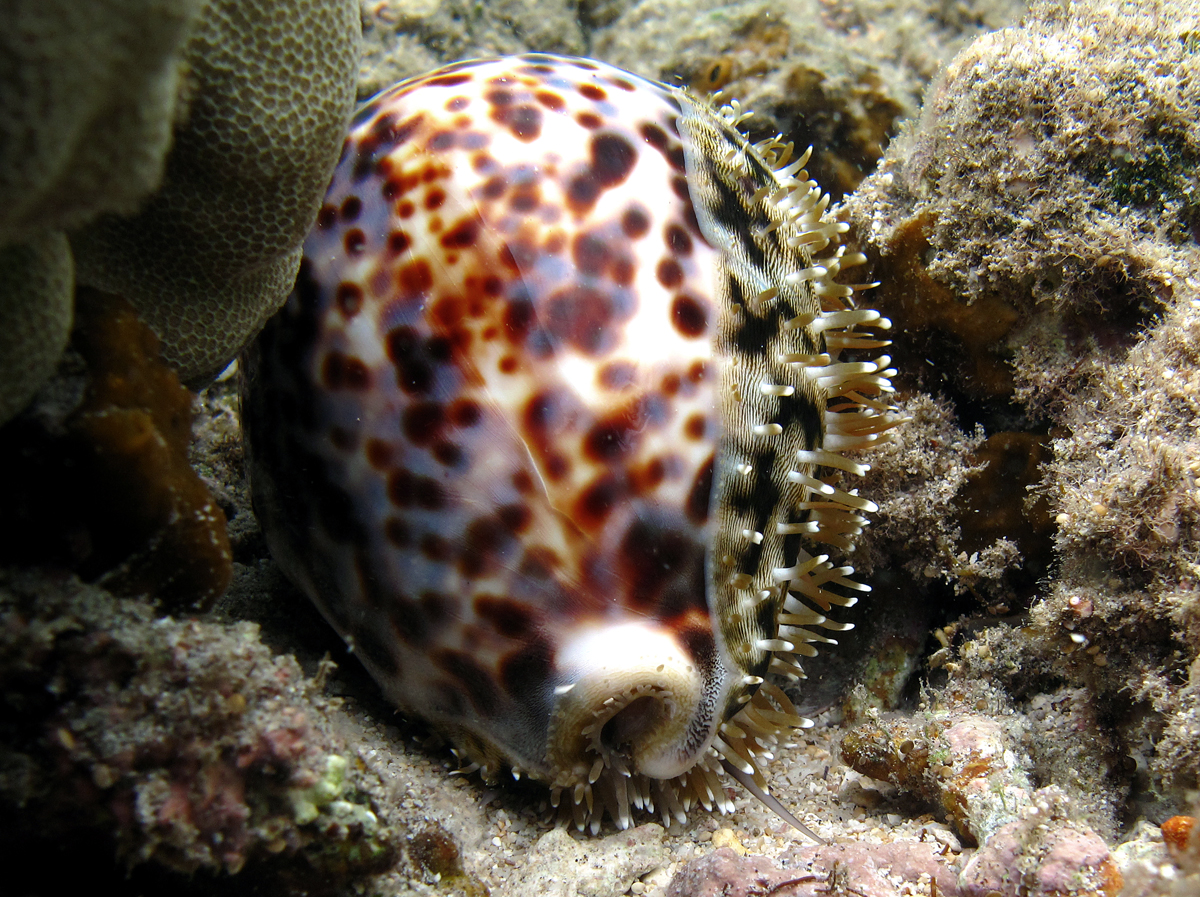 La porcelaine Cypraea tigris à la Réunion.